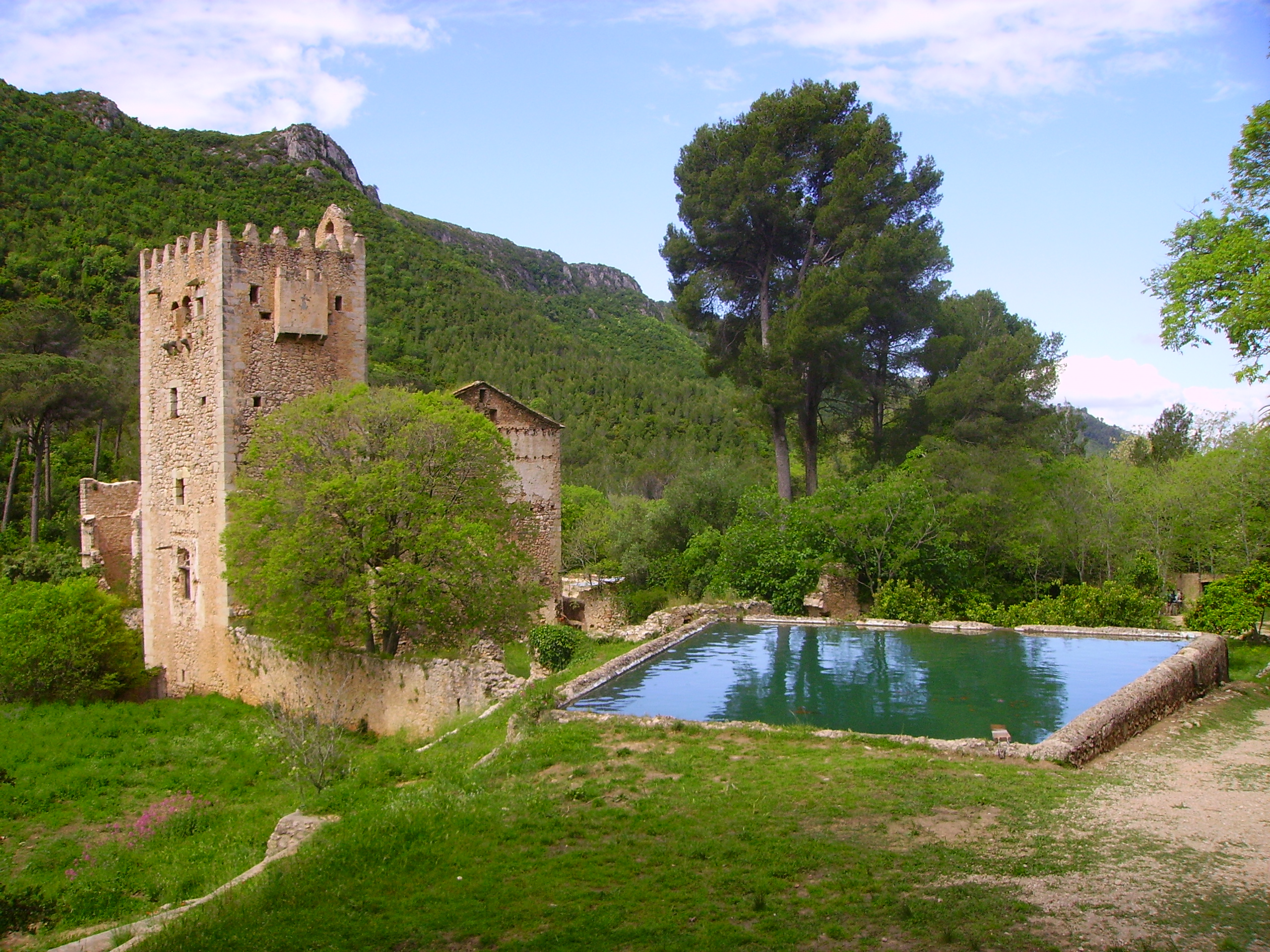 Monasterio de la Murta, Alzira